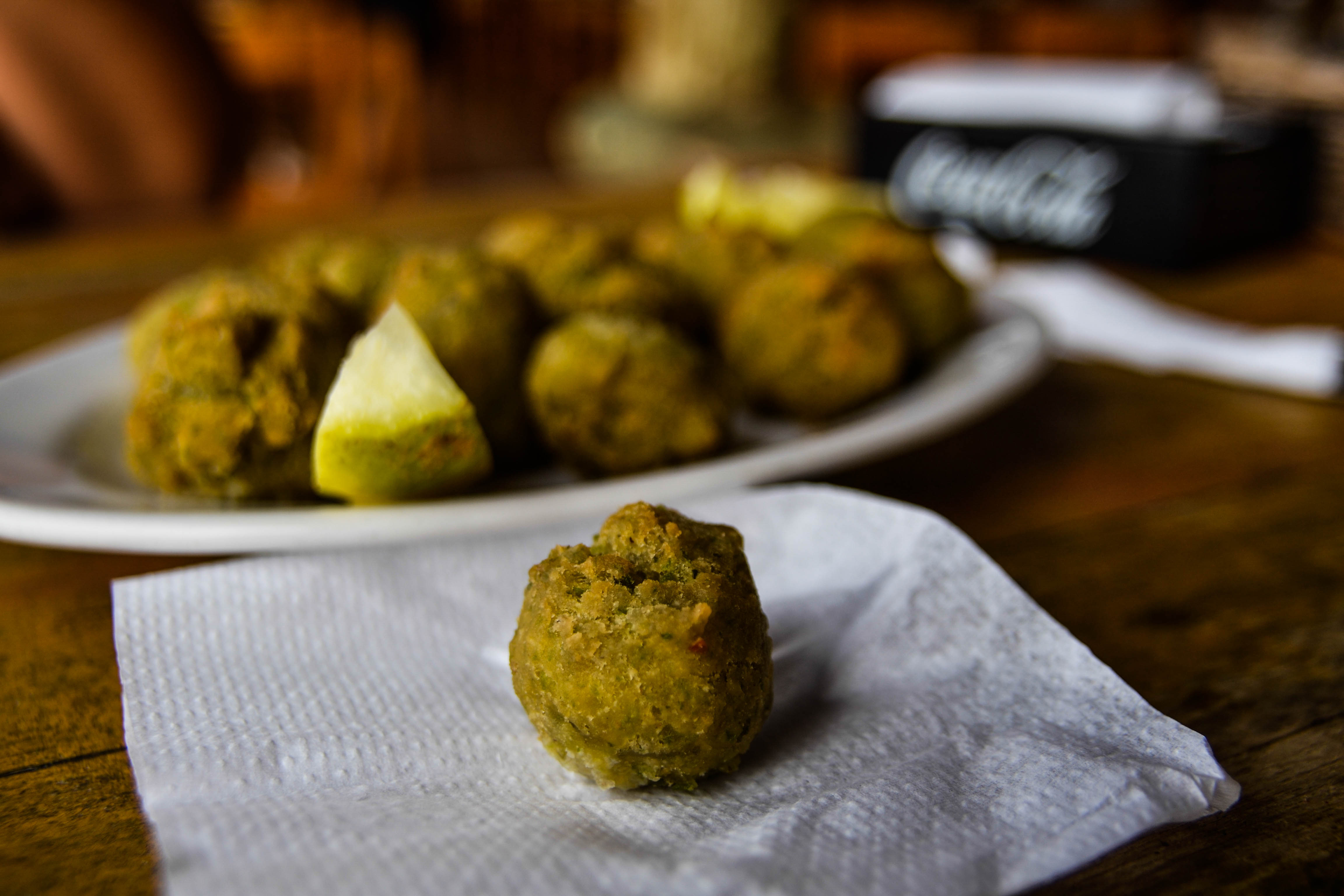 Gastronomía en las Costas de Rocha - Uruguay